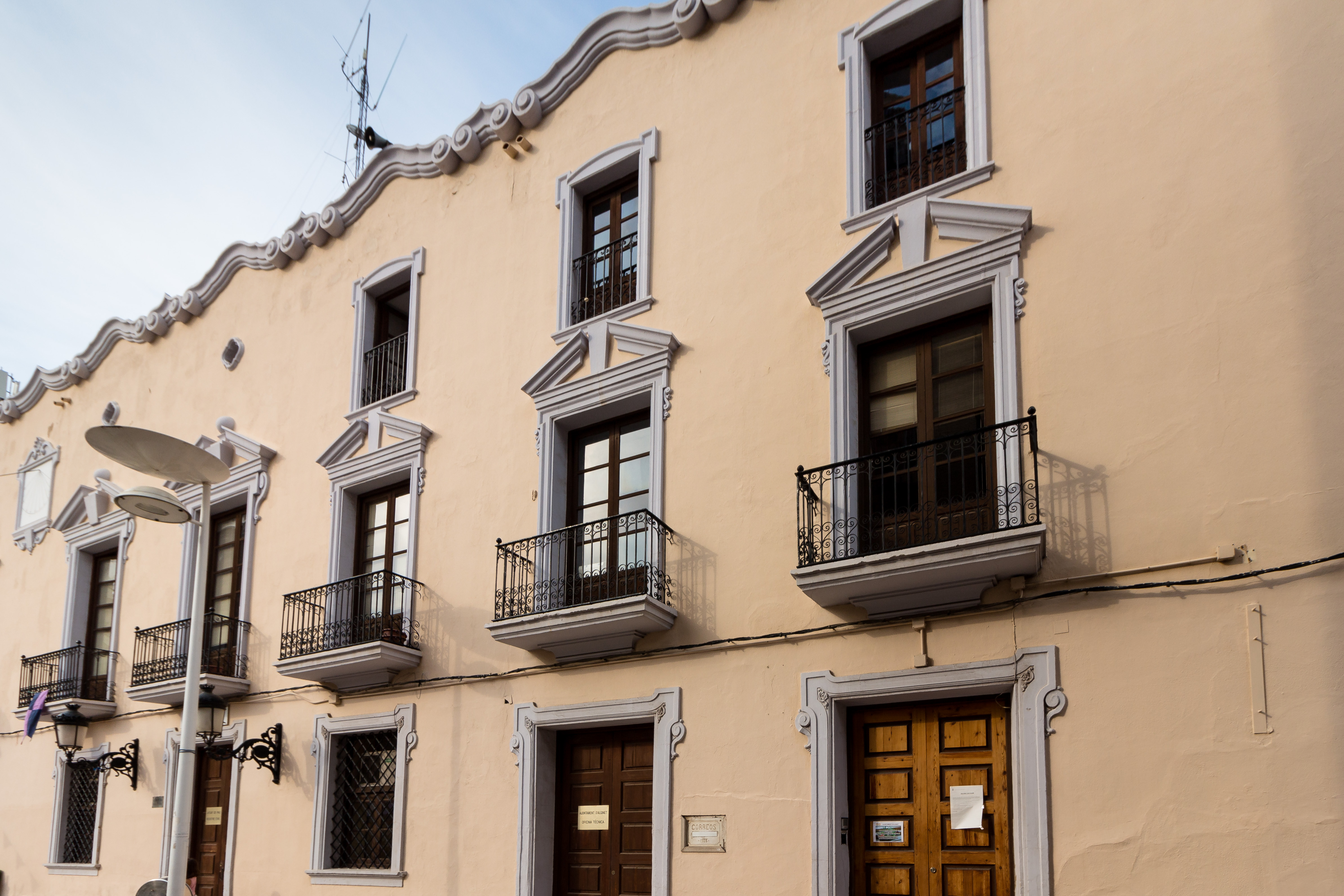 Ayuntamiento de Alginet 20.031-002.